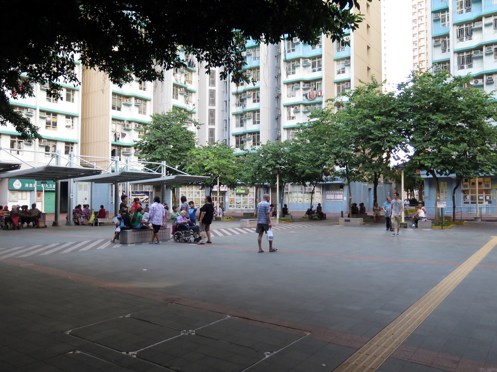 Oi Tung Estate Plaza